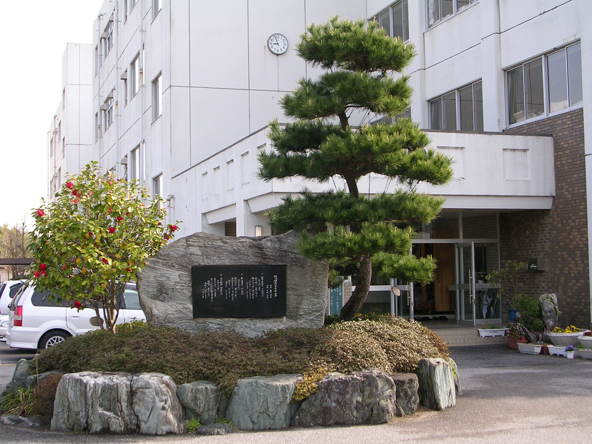 木更津市立清川中学校前庭